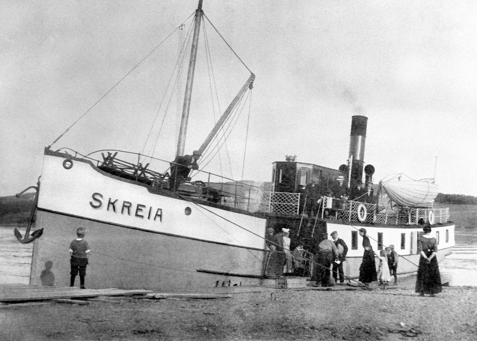 Rutebåt, brygge, passasjerer